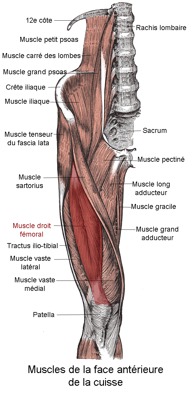 Muscle droit fémoral. Anatomie humaine